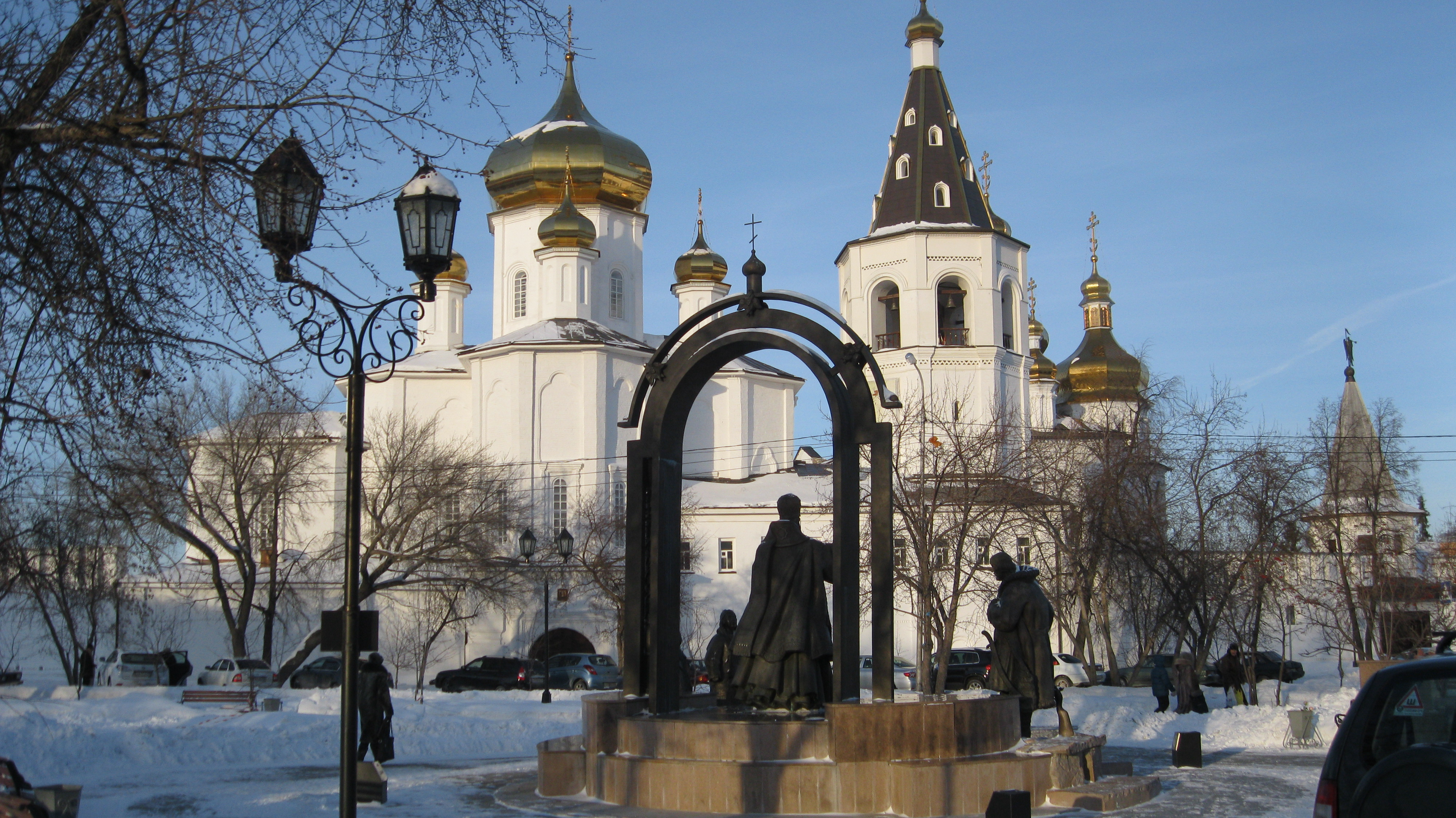 Церковь апостолов Петра и Павла Троицкого монастыря в Тюмени и памятник Крещению Сибири.